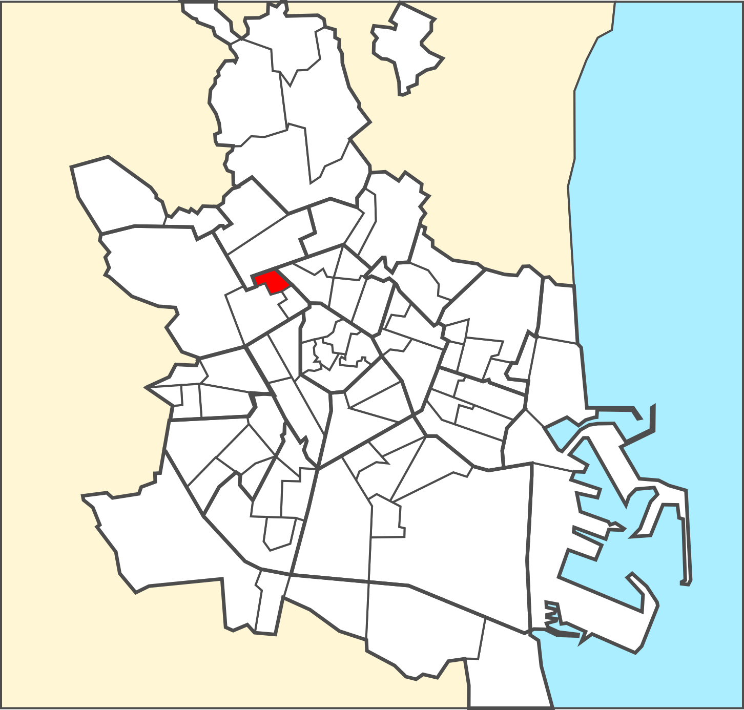 Localització del barri dins de la ciutat de València.